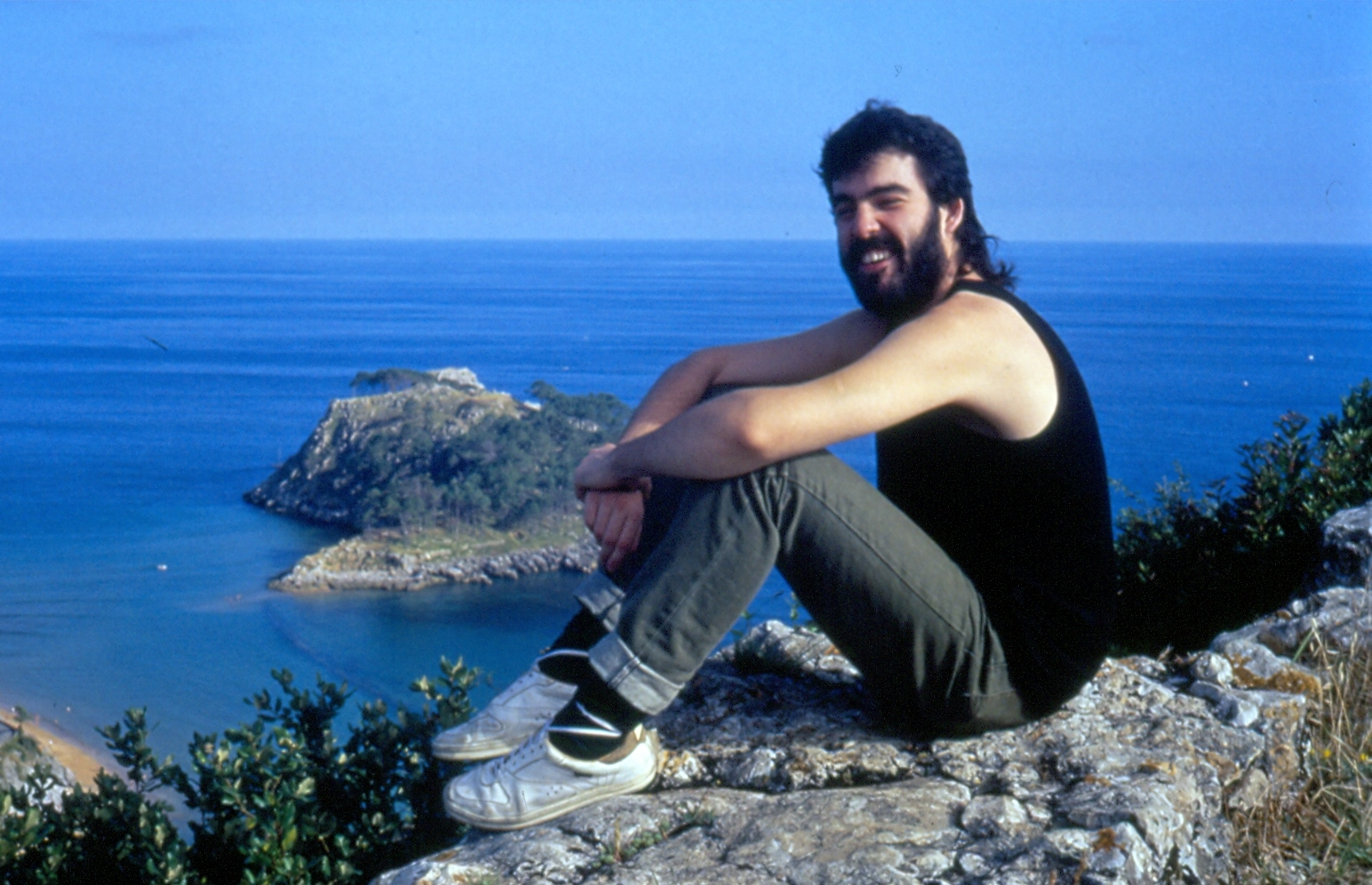 Euskal gazte bat "mullet" ile ebakerarekin, 1991ean